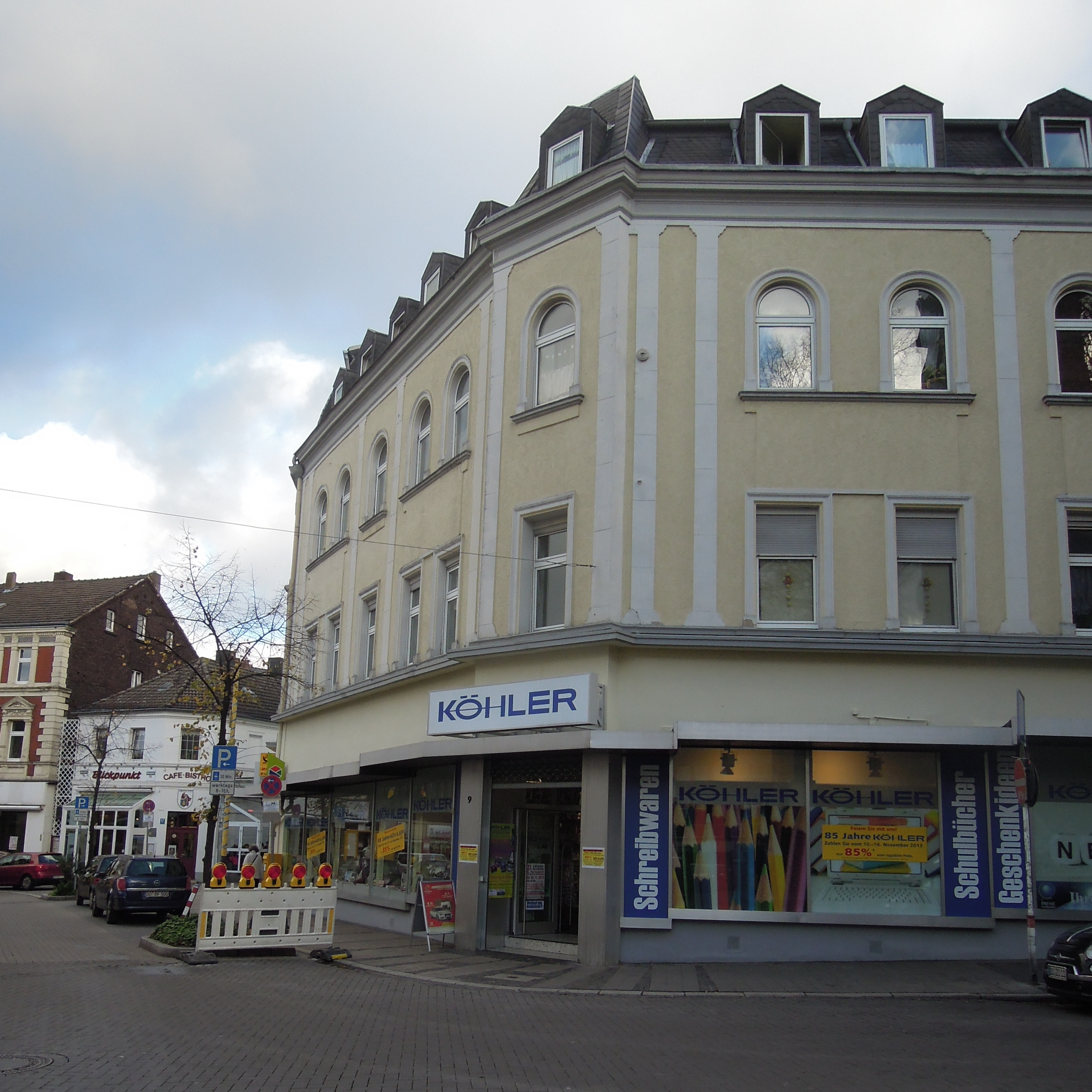 Lage des Stolpersteins Dortmund Limbecker Straße 9 Hans-Moritz Bernhard